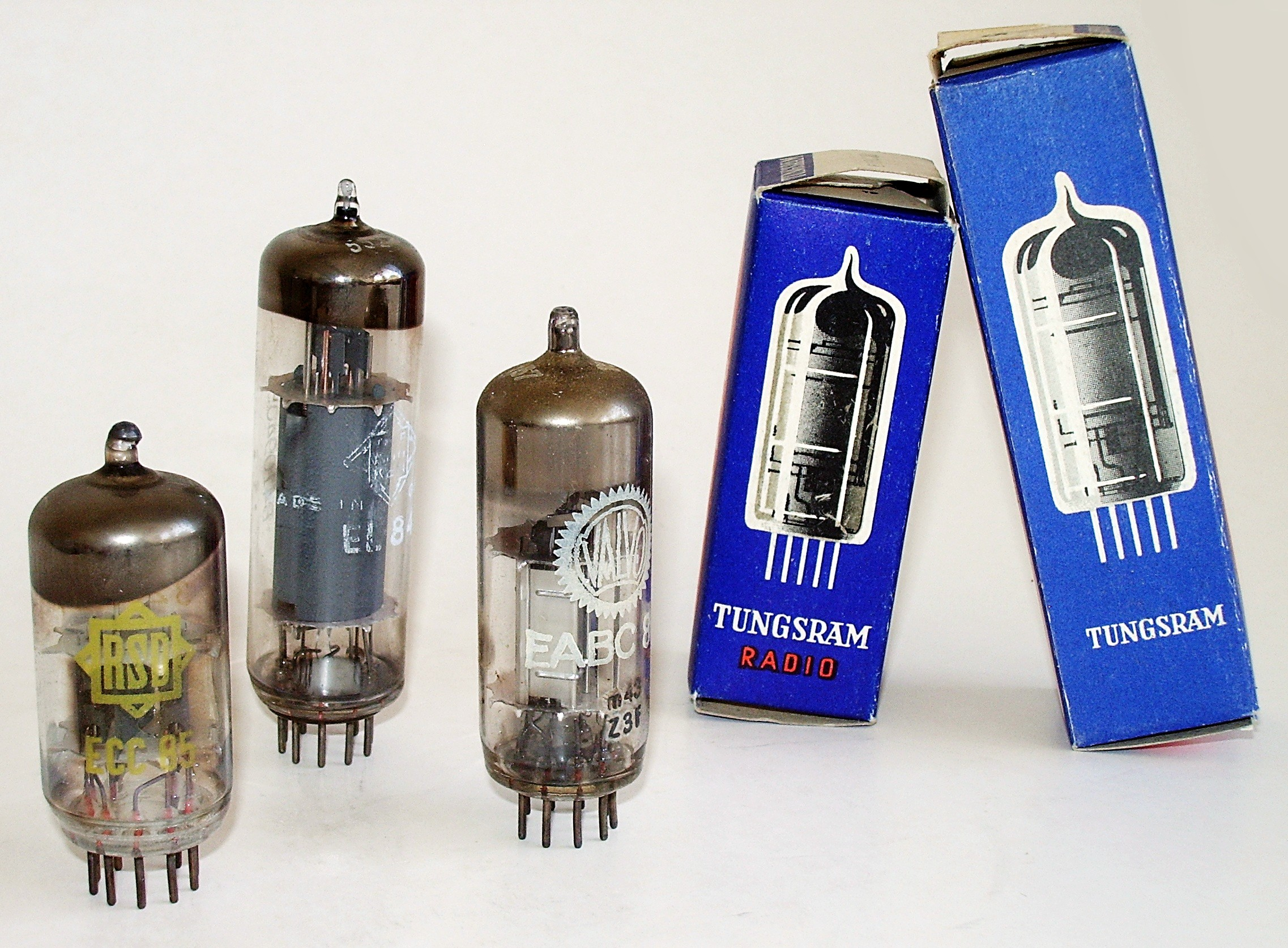 Radio vacuum tubes - ECC85, EL84, EABC80